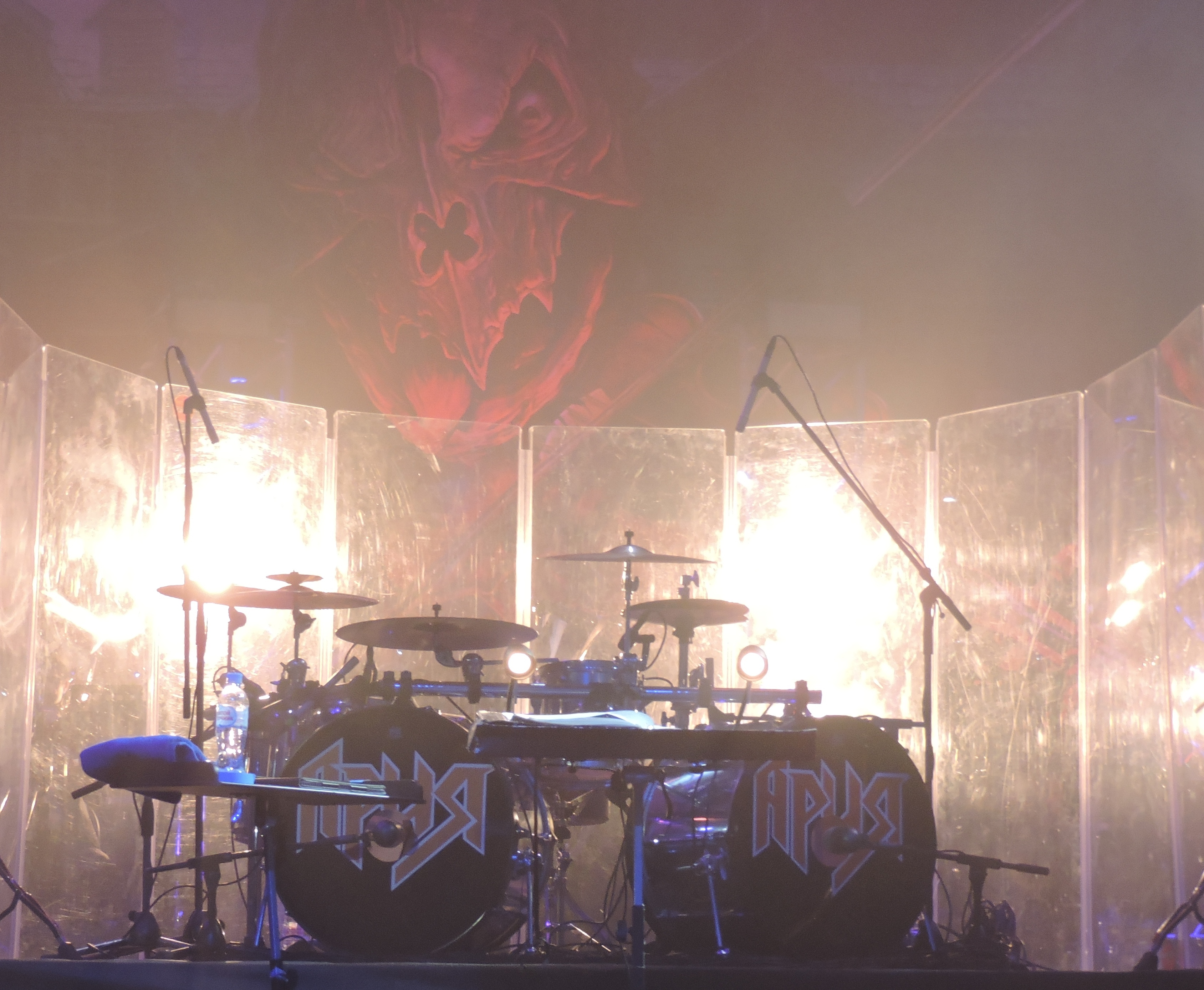 Ударная установка Максима Удалова